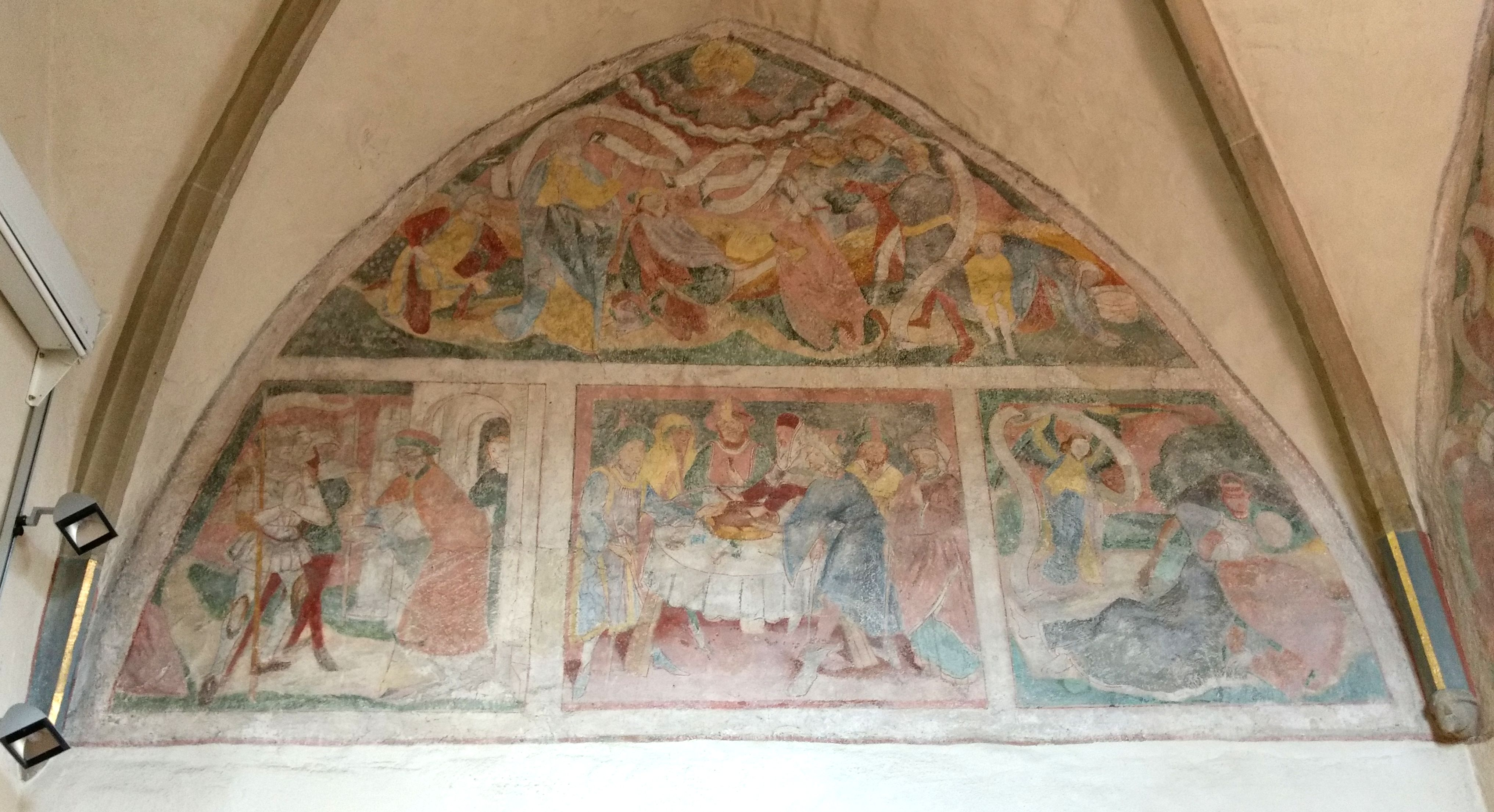 Nikolauskirche Mundelsheim, Wandmalereien an der Chornordwand